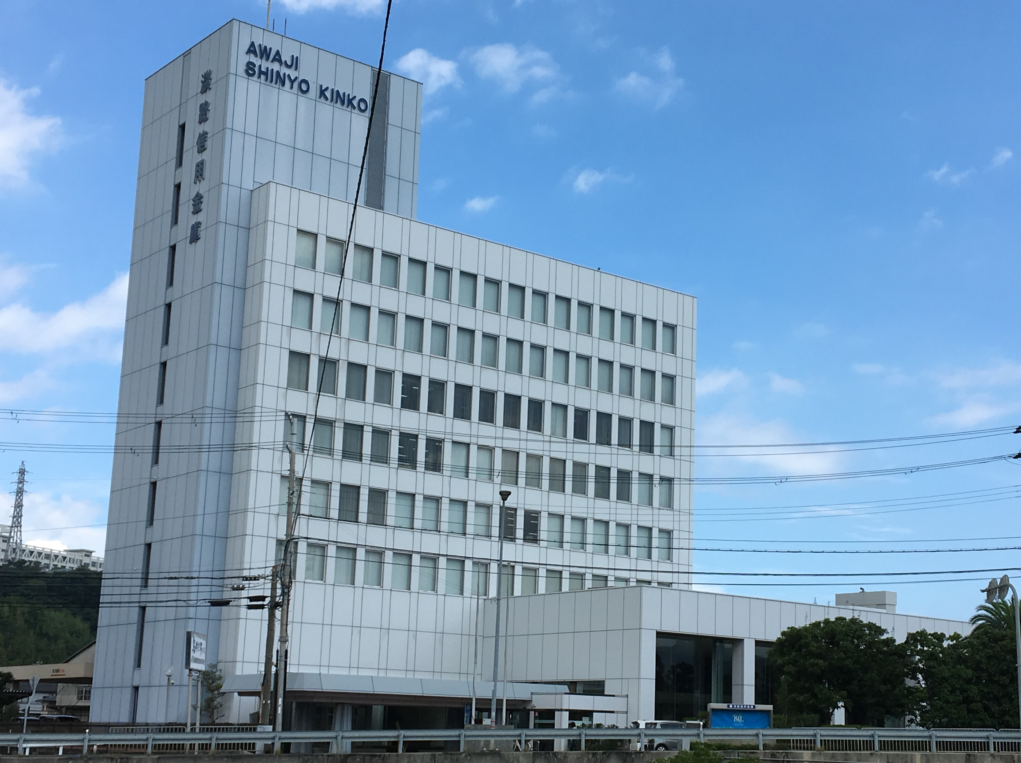 淡路信用金庫本店